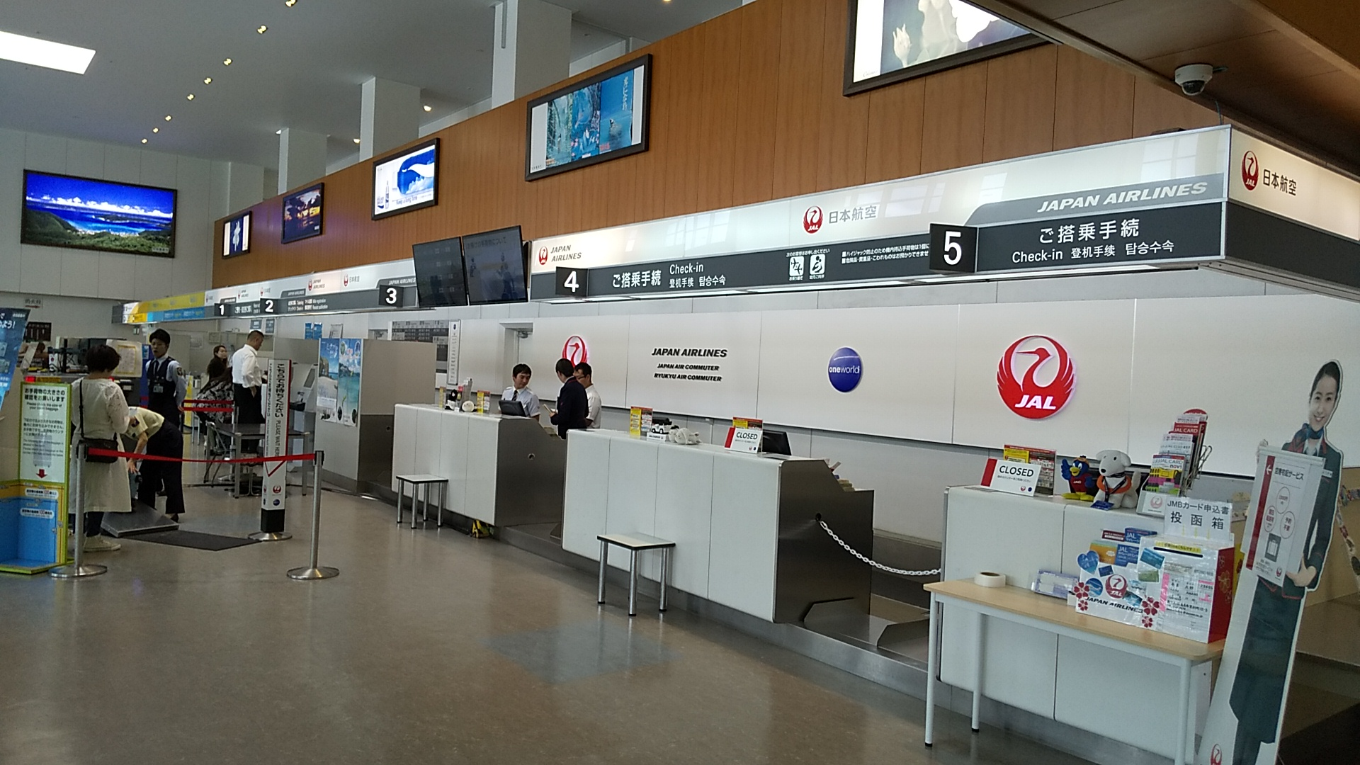 奄美空港カウンター、手前からJALグループ（JAL・JAC・RAC）、バニラエア、スカイマーク